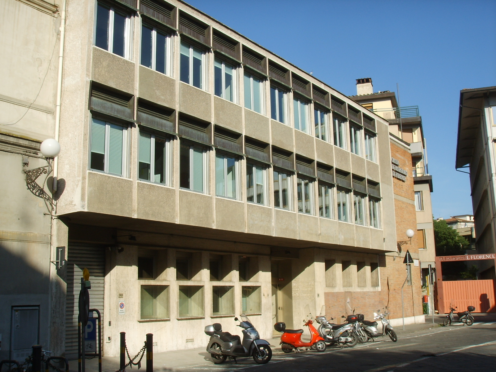 Ex sede del mattino